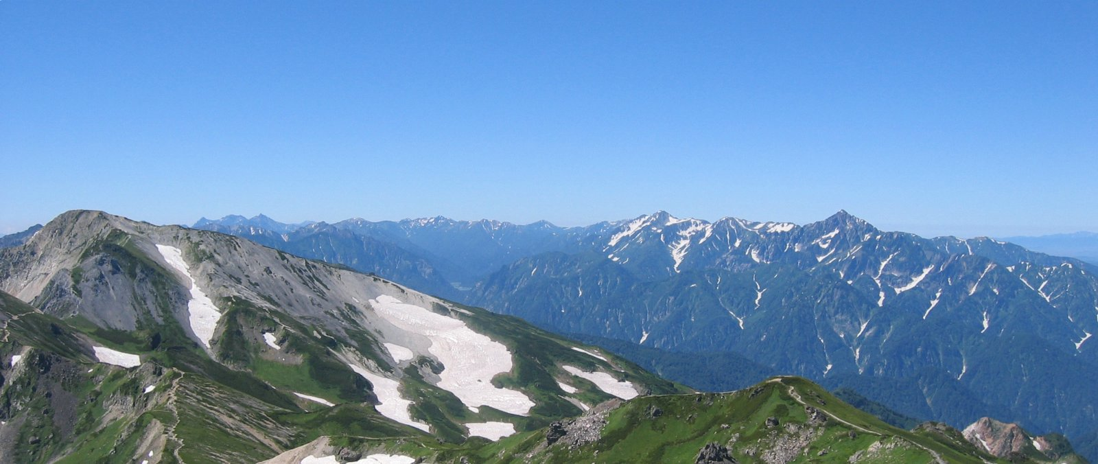 白馬岳から望む立山連峰 Canon IXY Digital 400